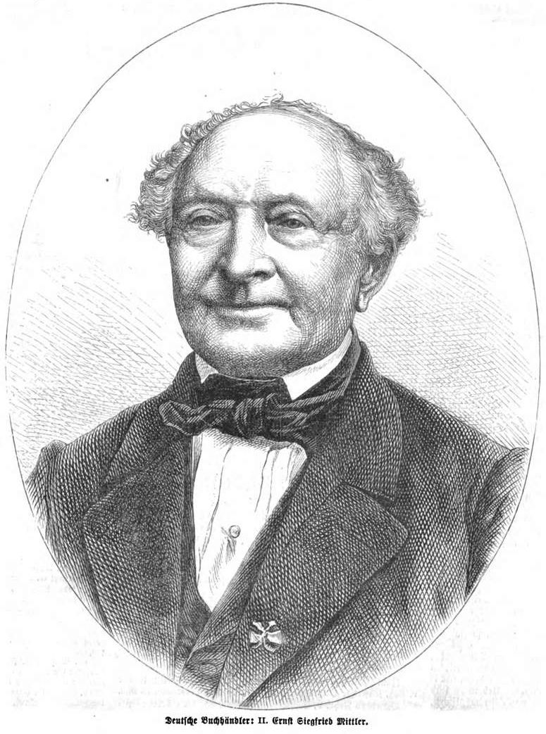 Ernst Siegfried Mittler, deutscher Buchhändler und Verleger im 19. Jh.